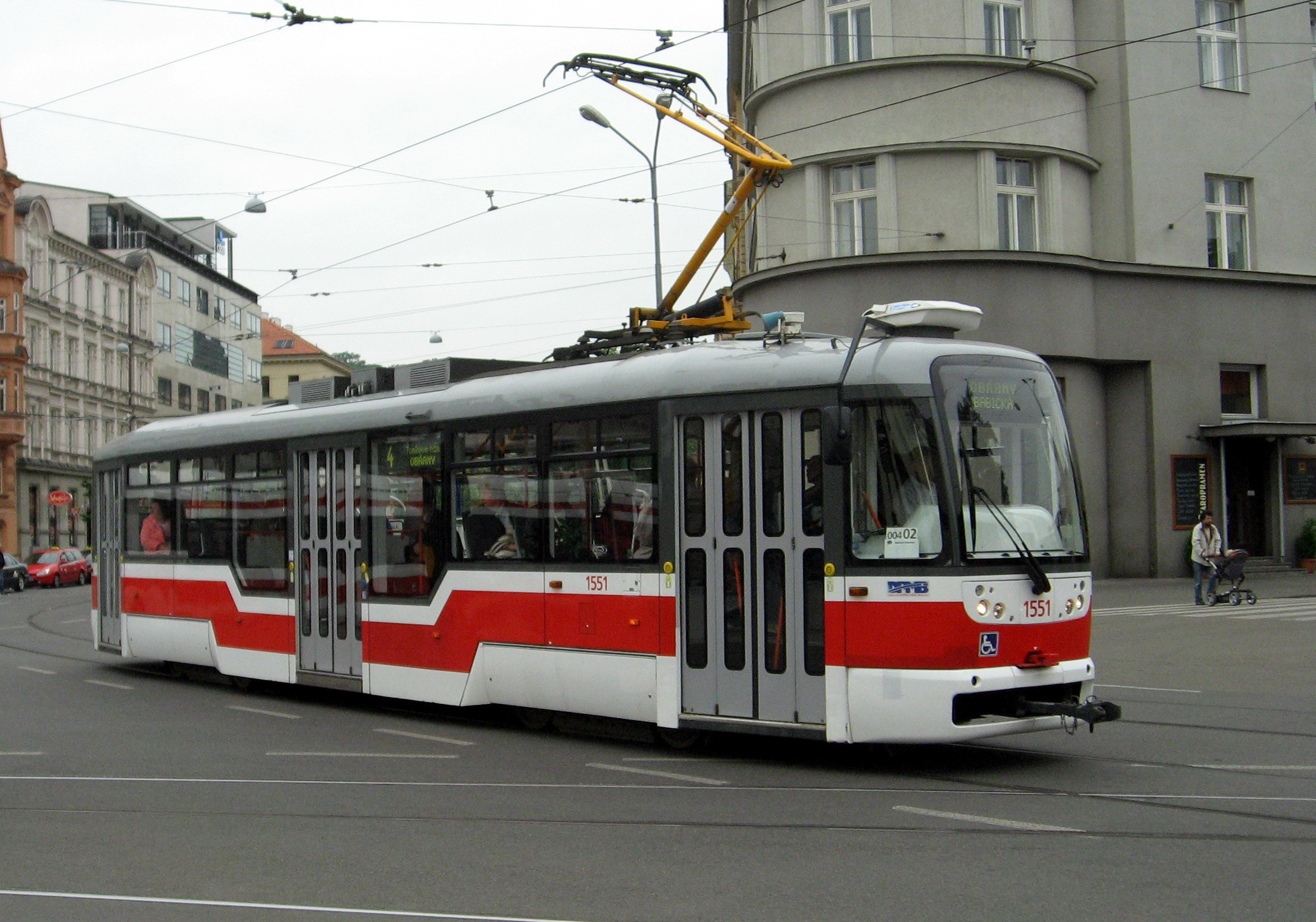 Vario LF v Brně